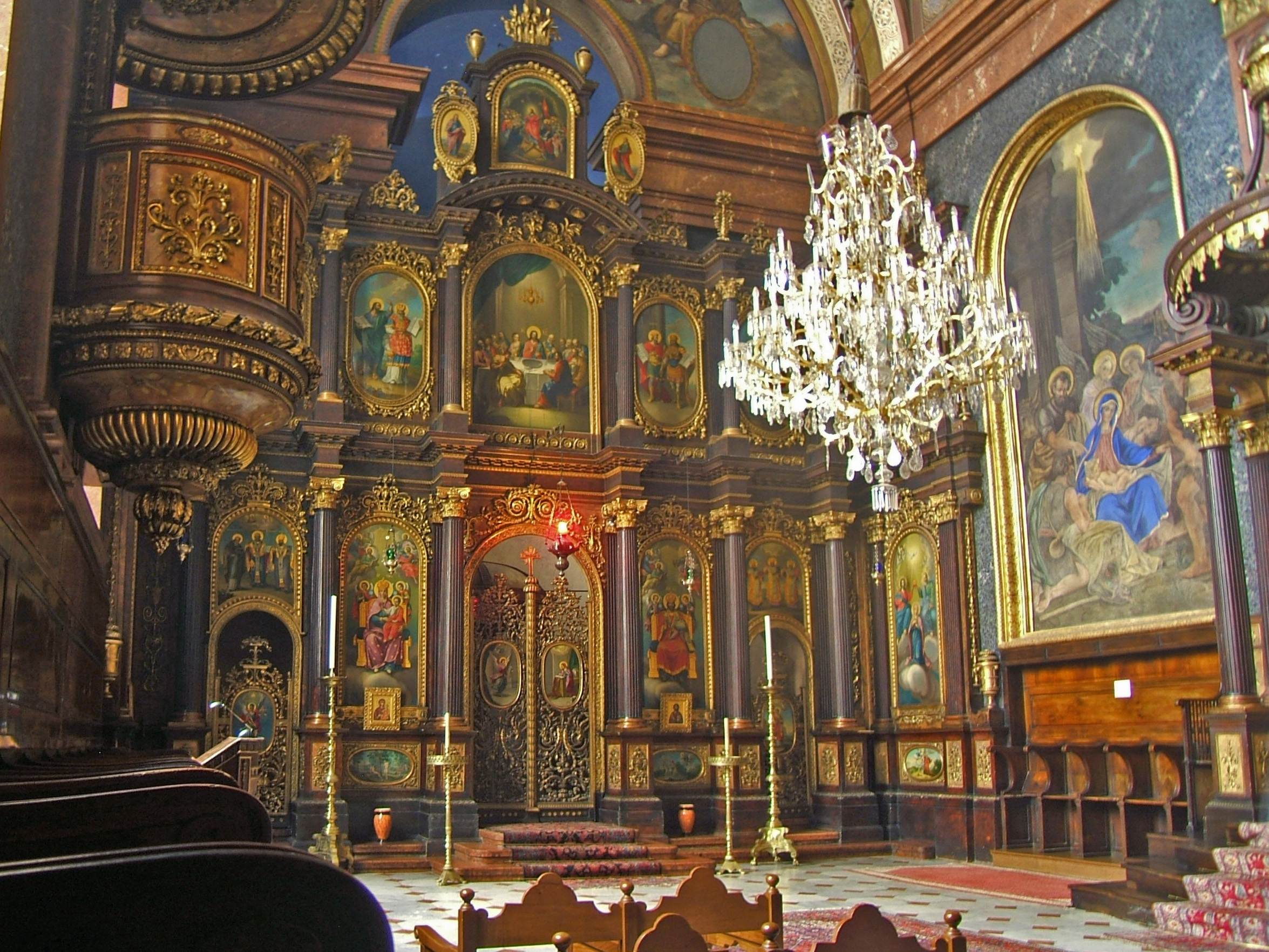 Griech.-orient. (orth.,nichtun.) Kirche Hl. Dreifaltigkeit m.Pfarr- u.Schulhaus